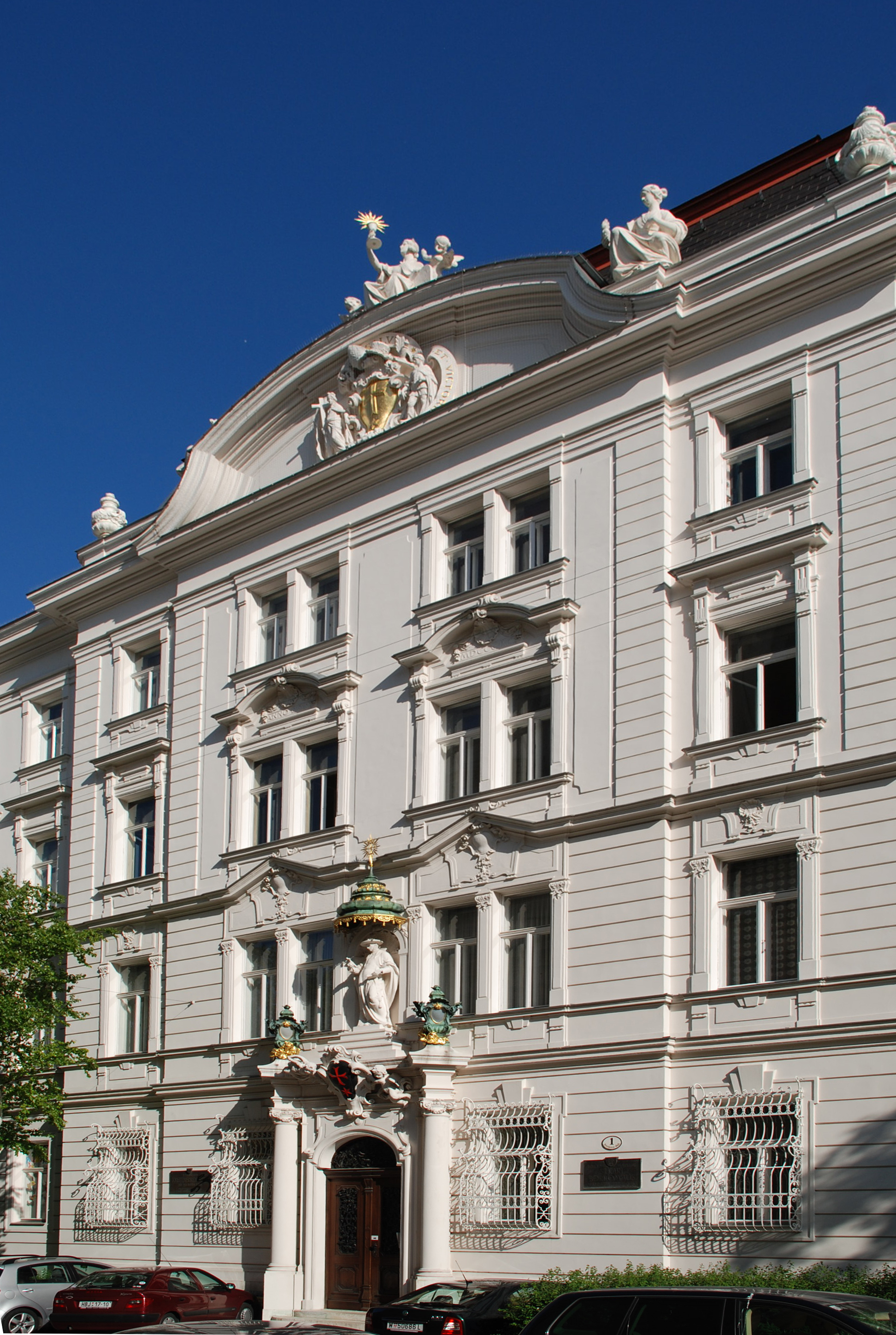 Wien Wieden: Kreuzherrengasse 1, Kreuzherrenhof: Pfarrhof der Karlskirche und Provinzialat des Kreuzherrenordens in Wien